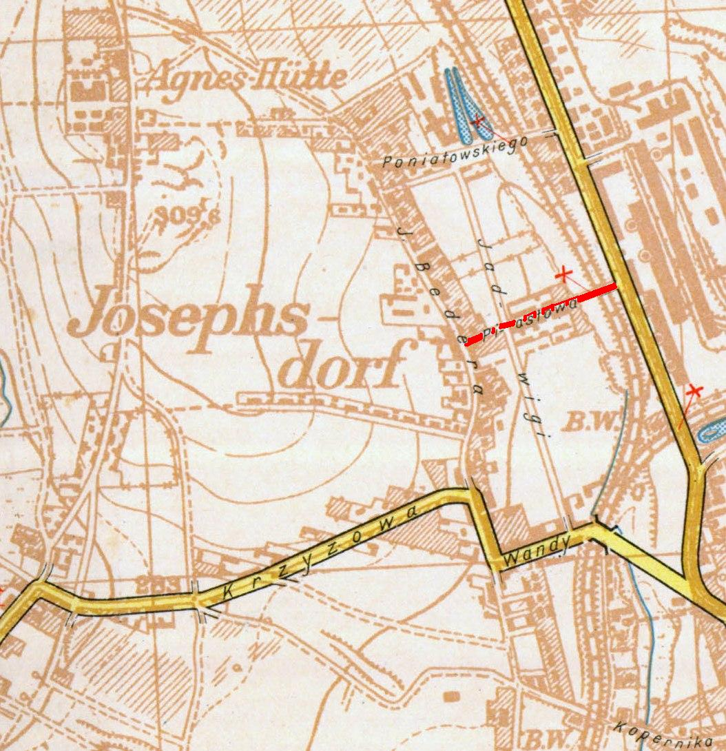 Ulica Gnieźnieńska w Katowicach - zaznaczona czerwoną linią - na mapie niemieckiej z roku 1939